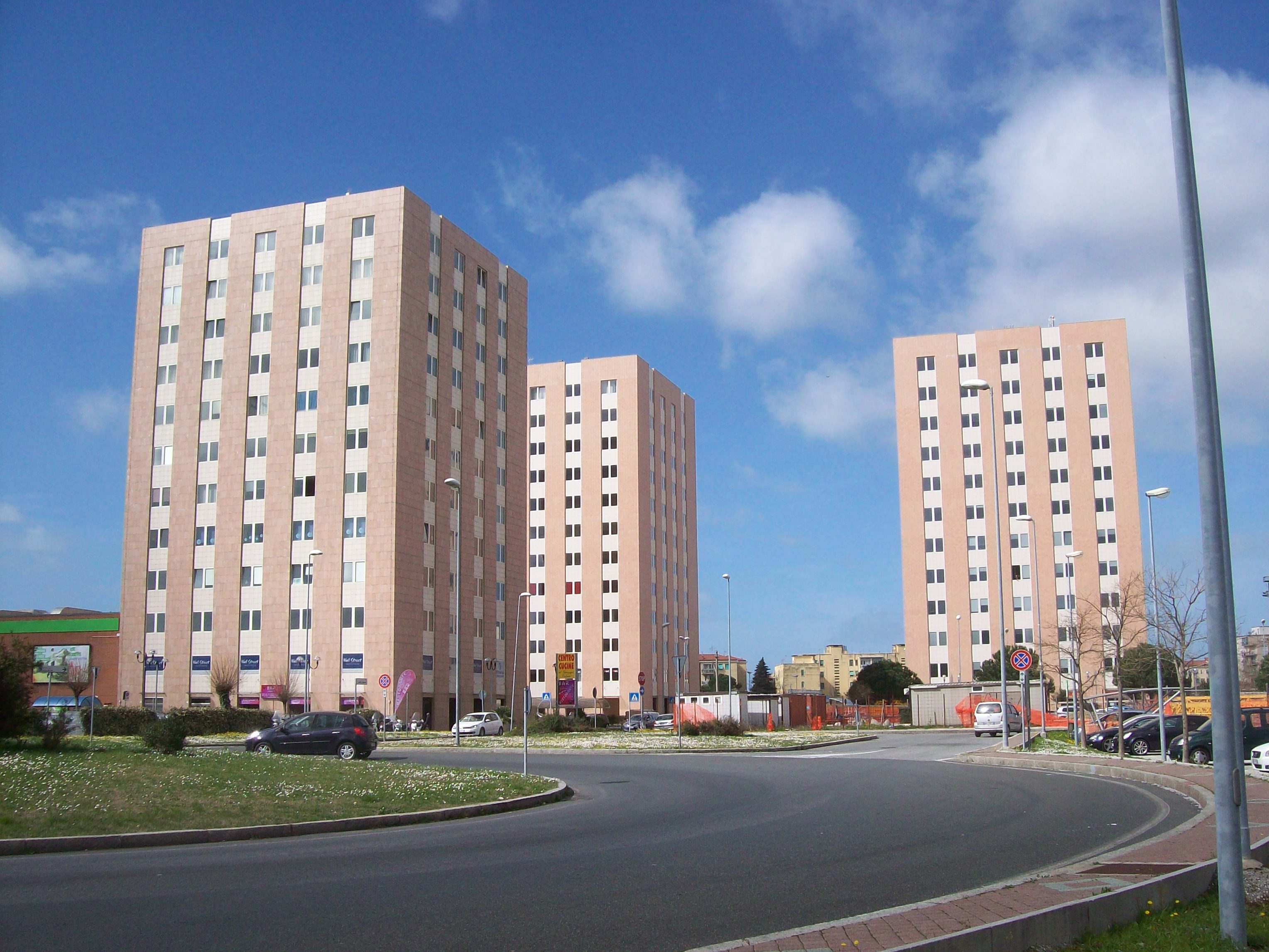 Le "torri" di Porta a Terra a Livorno.